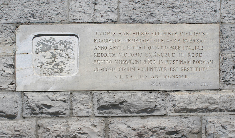 Lapide in latino che ricorda i lavori di restauro del Broletto terminati nell'anno 1927 apposta sull'edificio e restaurata nell'anno 2000. Nella lapide si fa riferimento a Vittorio Emanuele III e a Benito Mussolini.